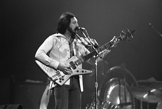 MLG Toronto 1980